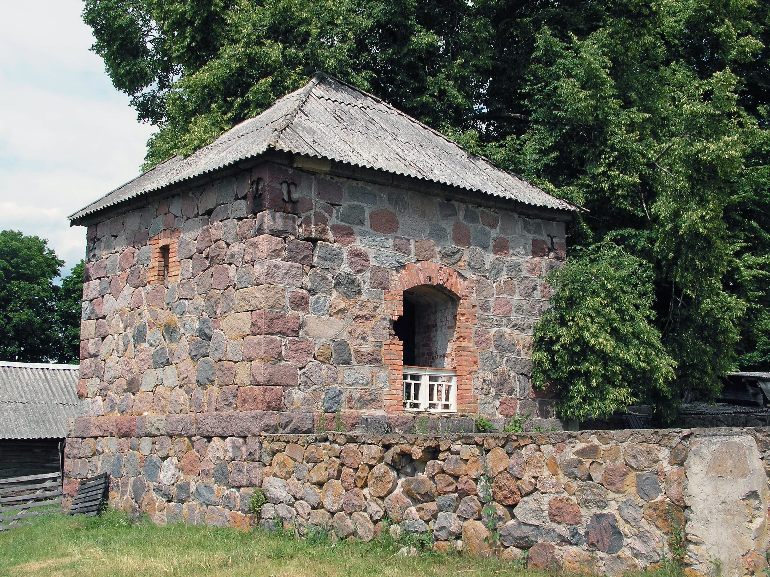 Беларуская (тарашкевіца): Мур касьцёлу Сьвятой Тройцы ў Данюшаве (Смаргонскі раён).